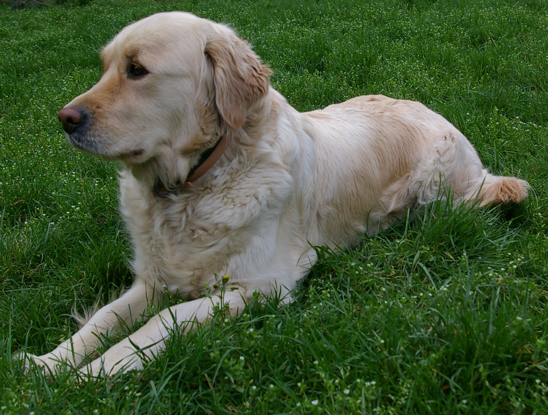 A female golden retriever. Her name is Utah.